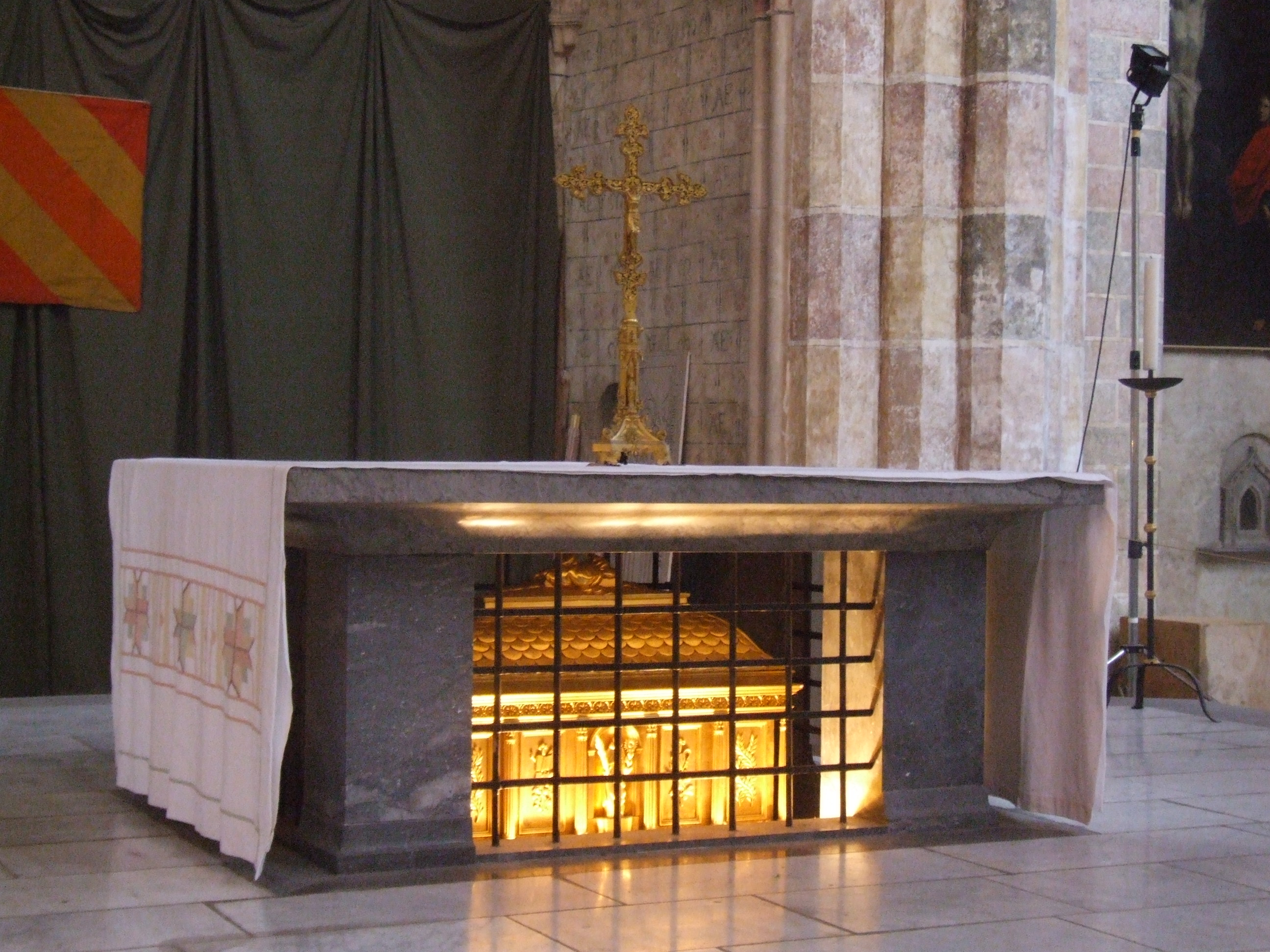 Reliquienschrein des Thomas von Aquin im Couvent des Jacobins; Toulouse